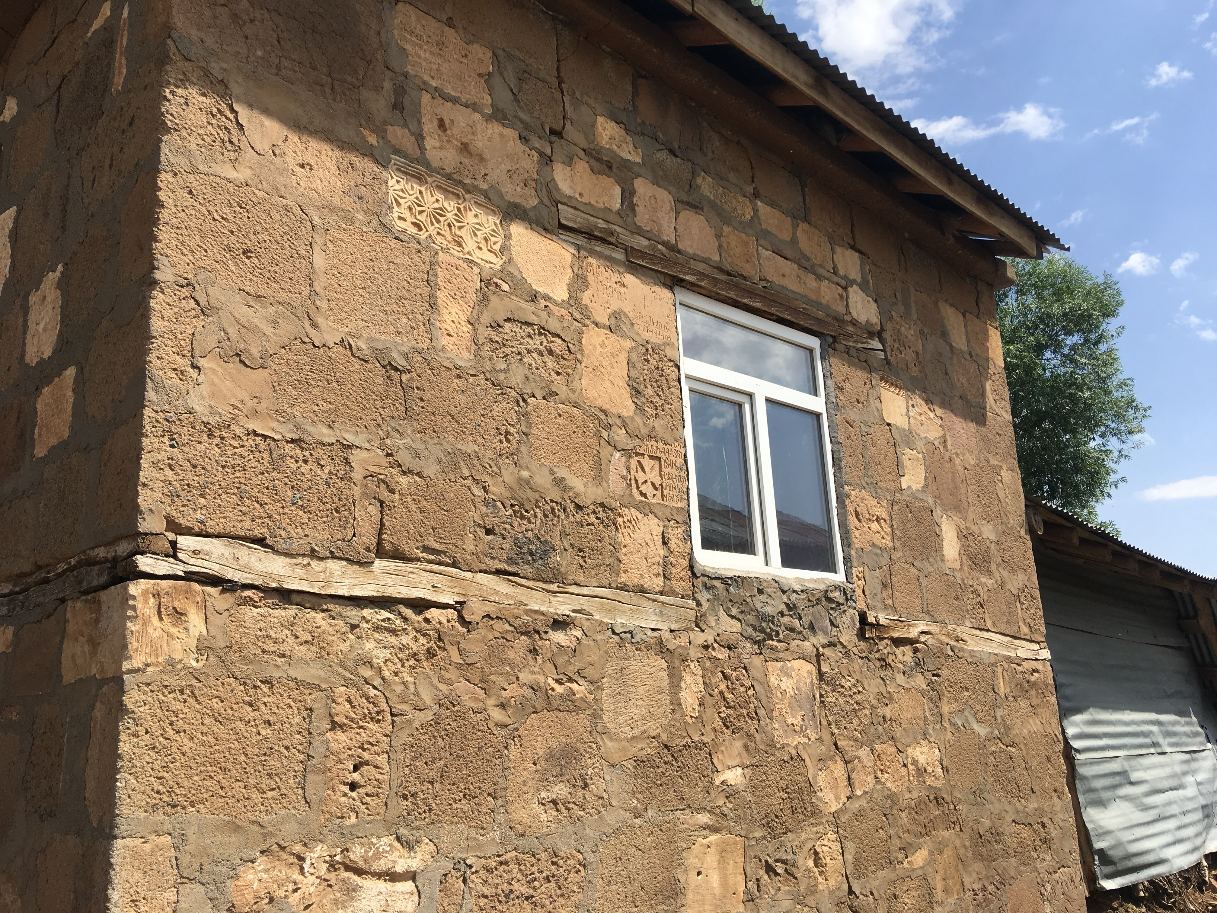 Մուշի նահանգի Յուքարըյոնգալը (Yukarıyongalı) գյուղի առանձնատներից մեկի պատերը՝ շարված Մշո Սուրբ Կարապետ վնաքի մնացորդներից: Վանքի ավերակները գտնվում են գյուղի կենտրոնում